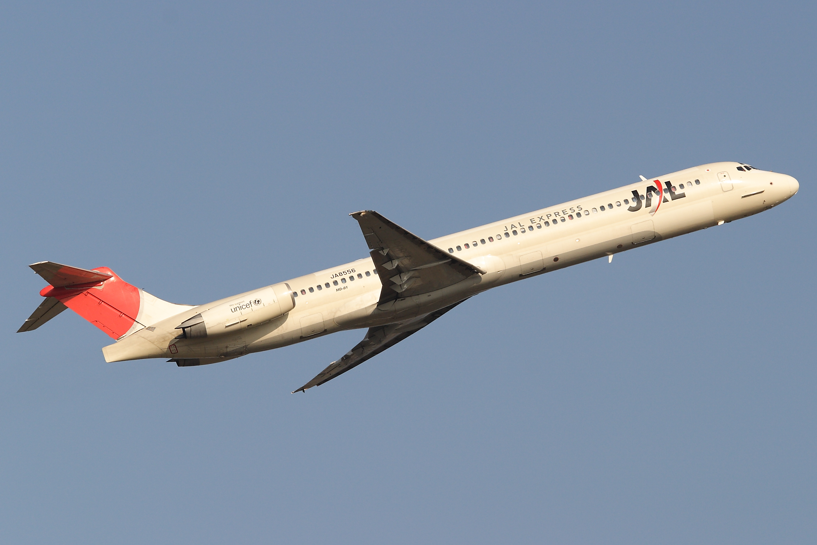 JALエクスプレス マクドネル・ダグラス MD-81 福岡空港